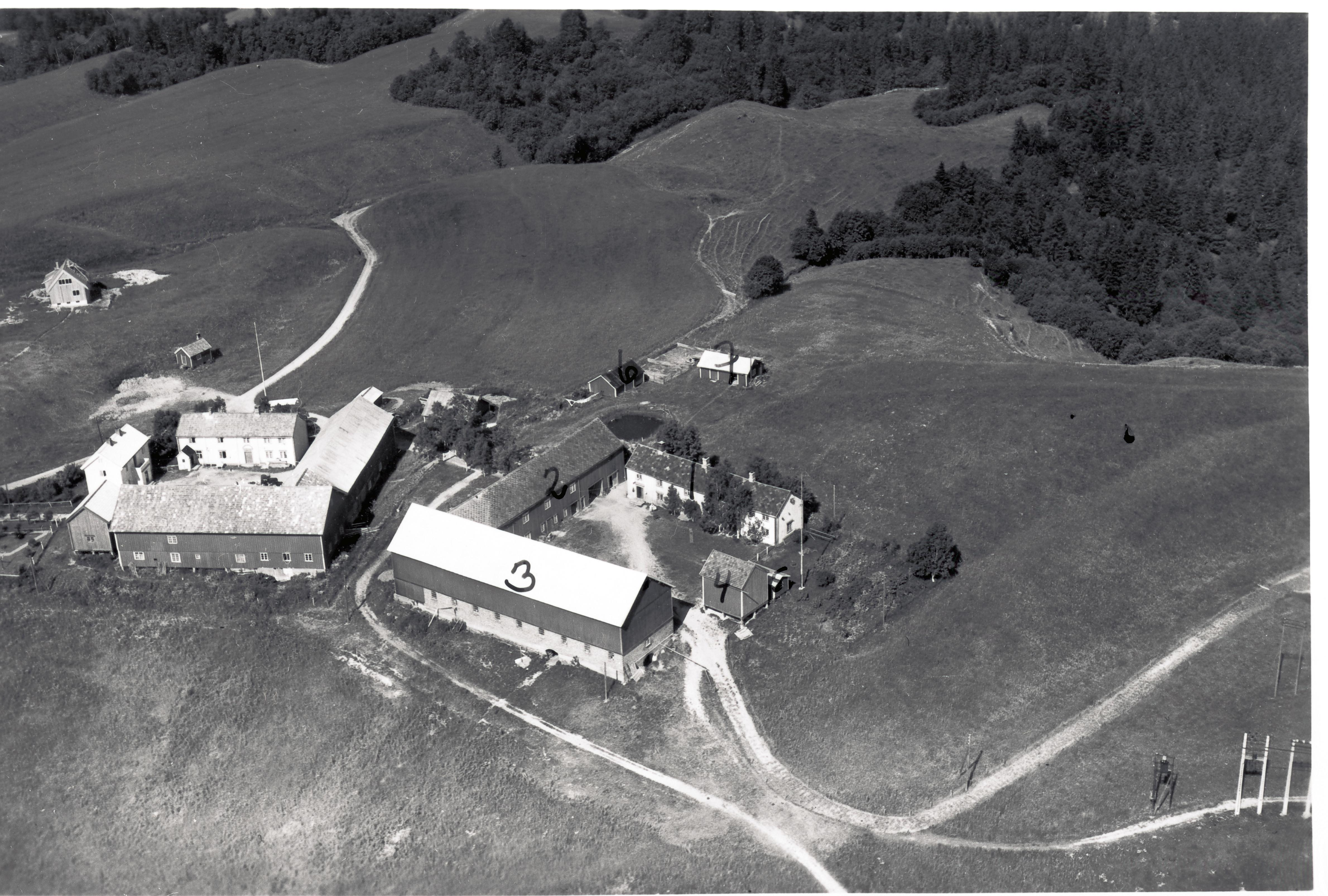 Gårder i Tiller: Okstad vestre og Okstad østre. Gårdsbruk med låve, fjøs, våningshus, uthus, jorder, trær.